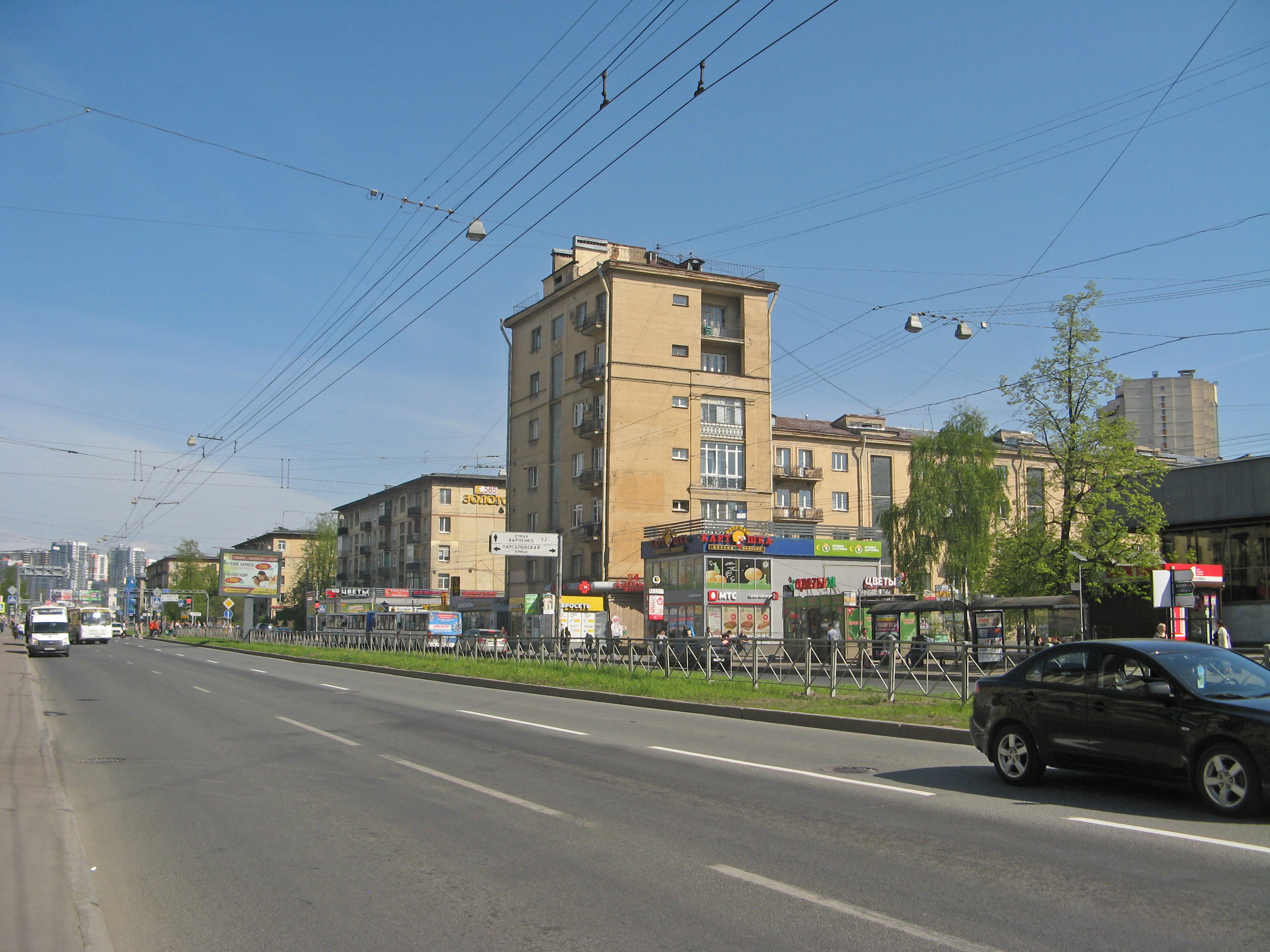 Кантемировская улица, Санкт-Петербург